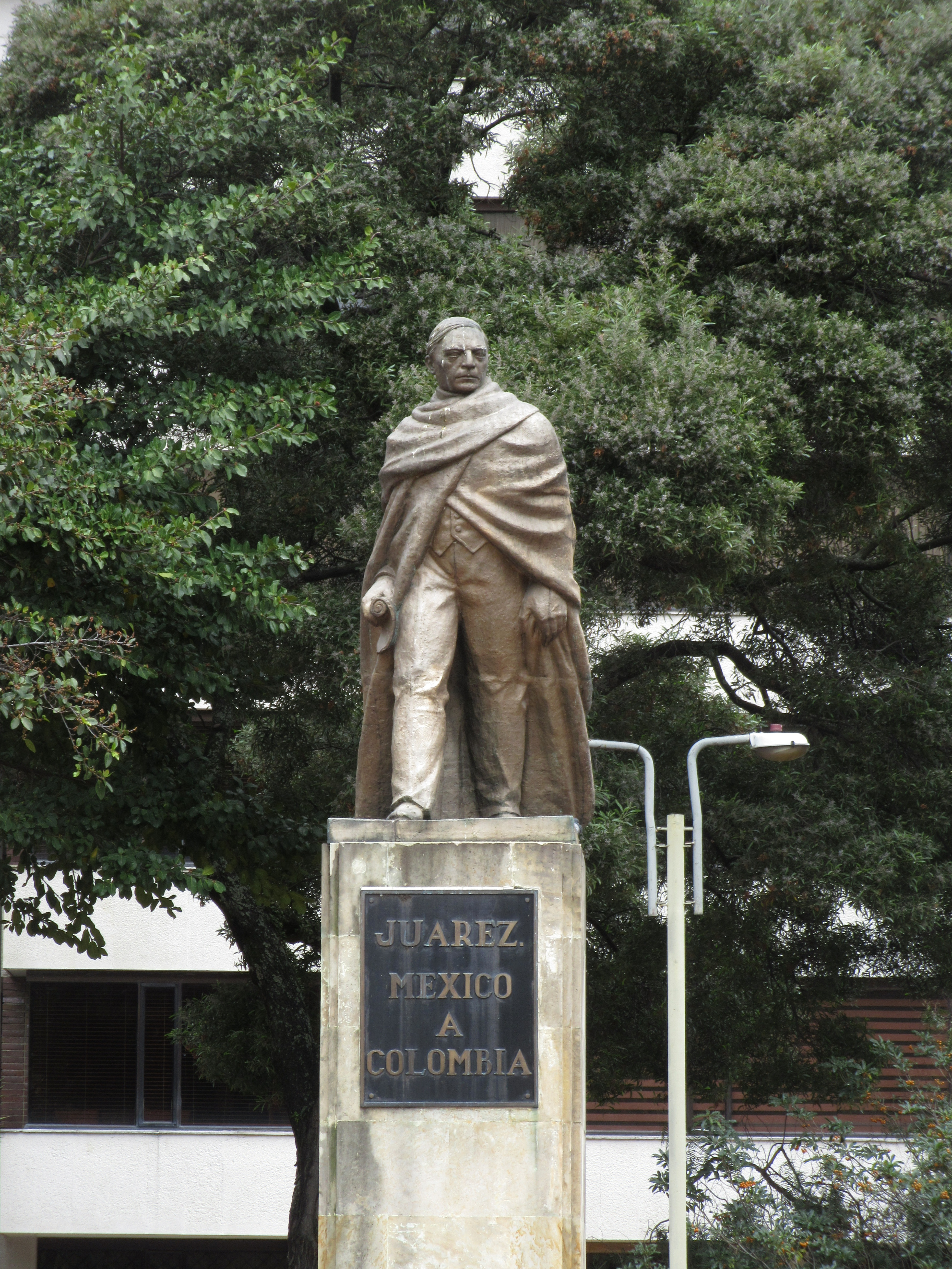 Benito Juárez, escultura en la carrera 11 con calle 77, en el parque El Nogal, al nororiente de Bogotá.